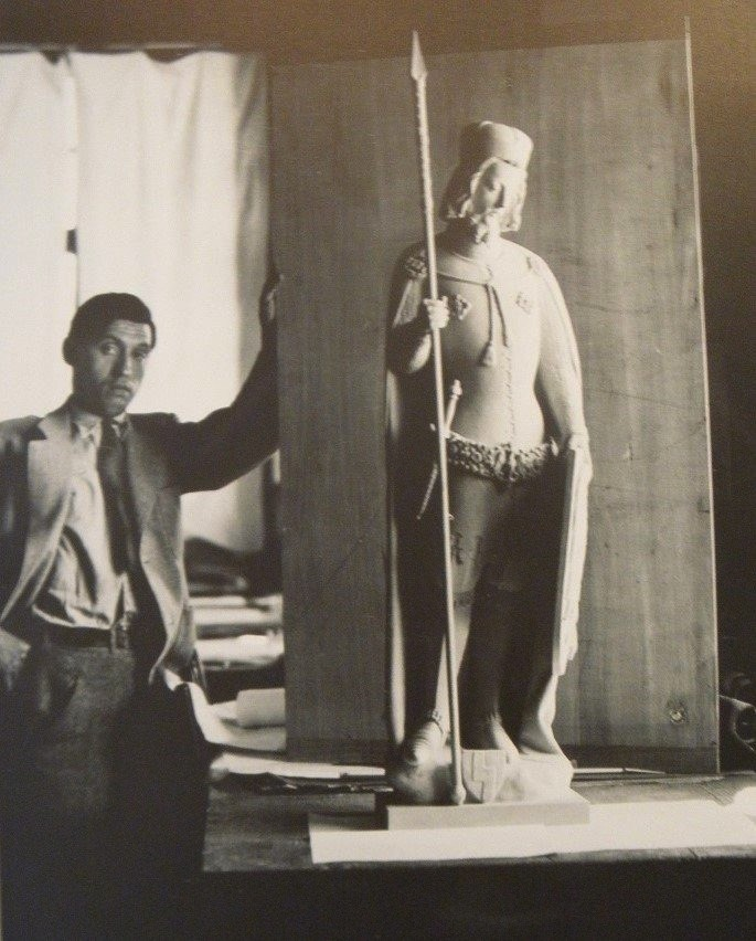 Karel Novák, český sochař